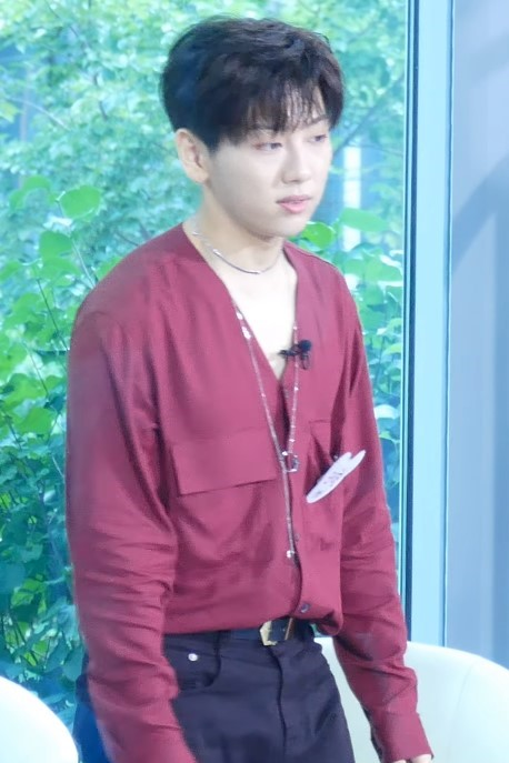 170718 상암 핫샷 직캠 6 HOTSHOT 젤리 Jelly tbs 팩트in스타